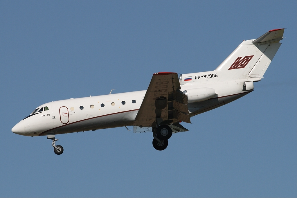 Aerolimousine Yakovlev Yak-40